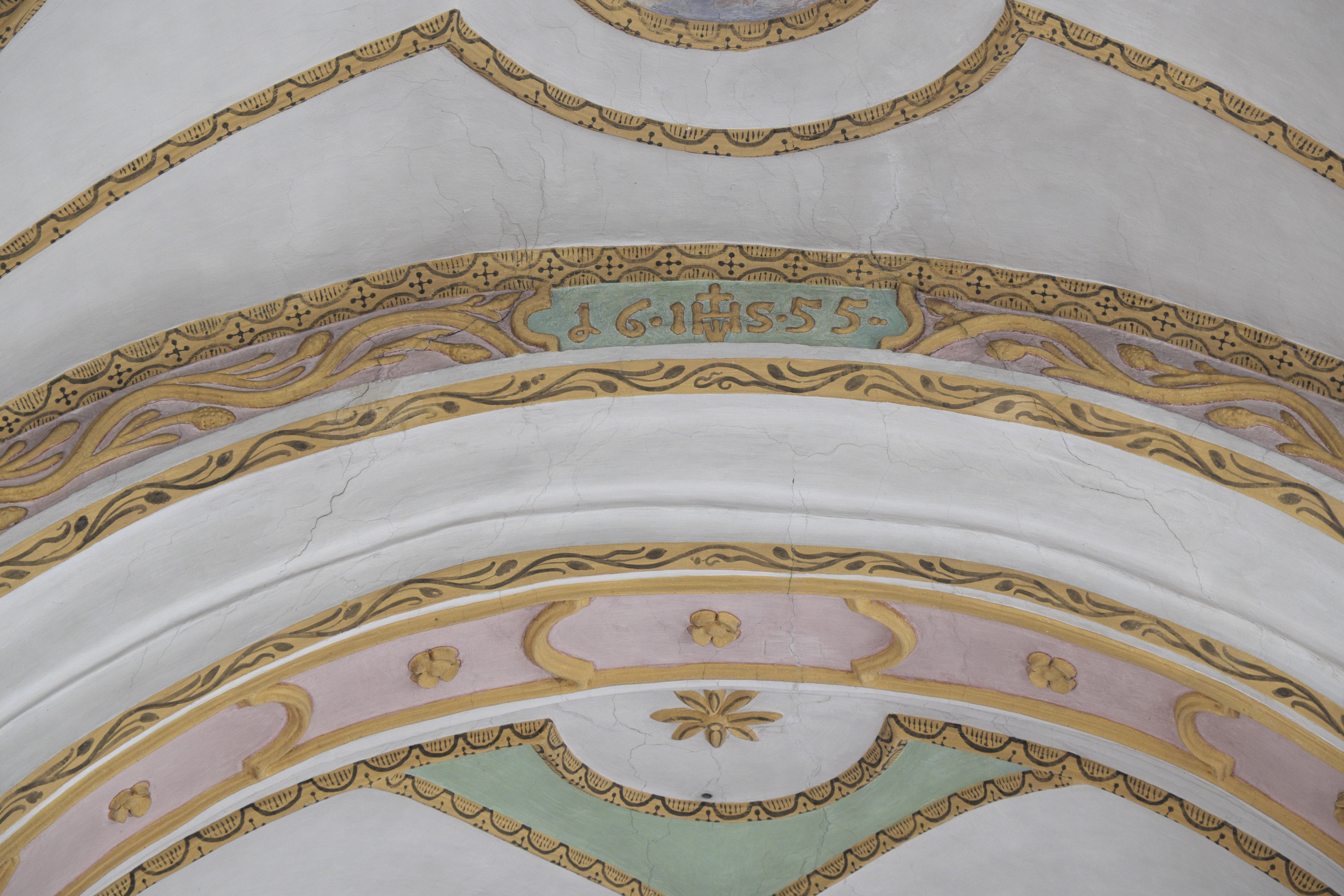 Katholische Pfarrkirche St. Andreas in Aying im Landkreis München (Bayern/Deutschland), Chorbogen mit der Jahreszahl 1655